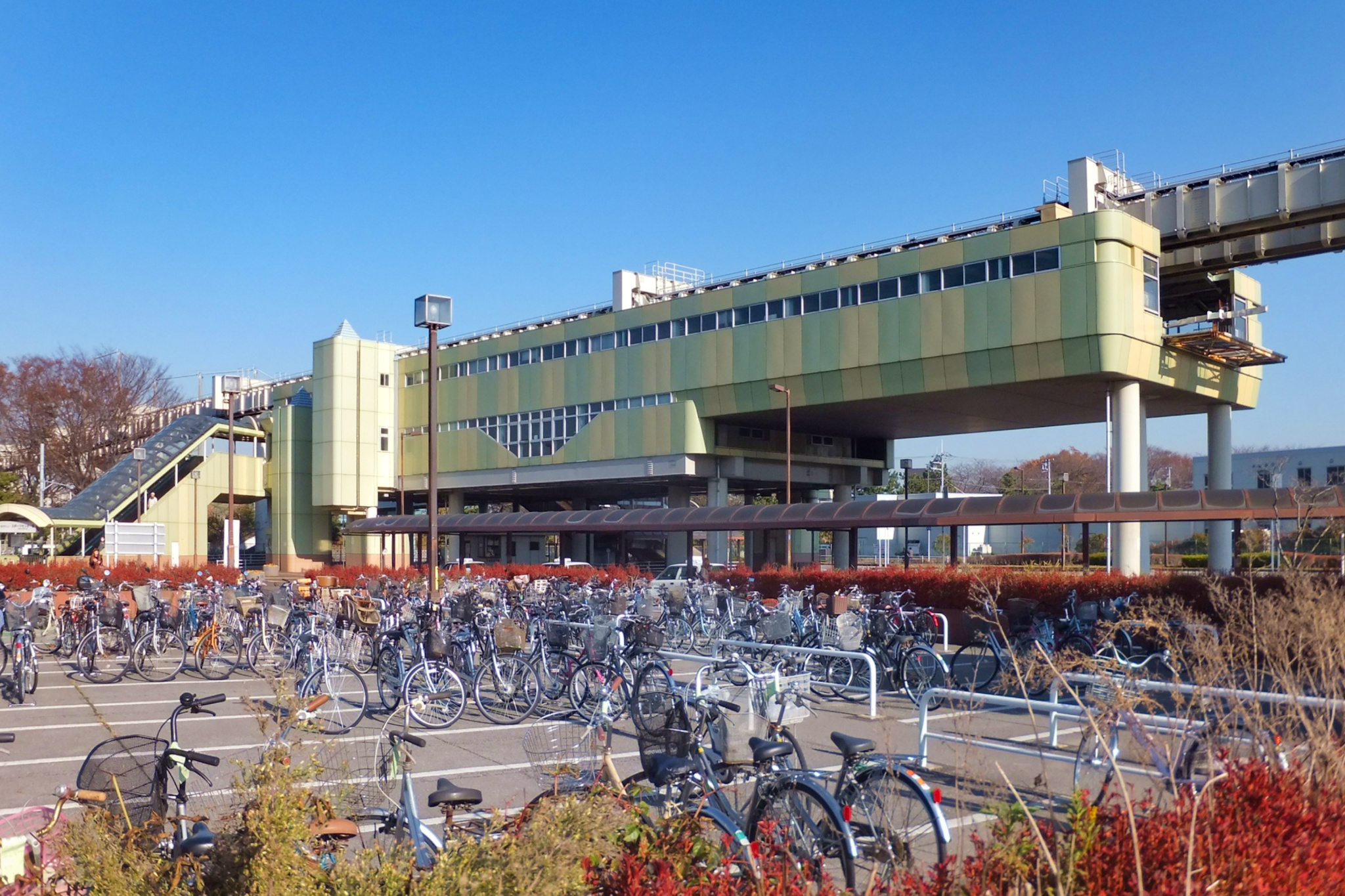 千葉都市モノレールスポーツセンター駅